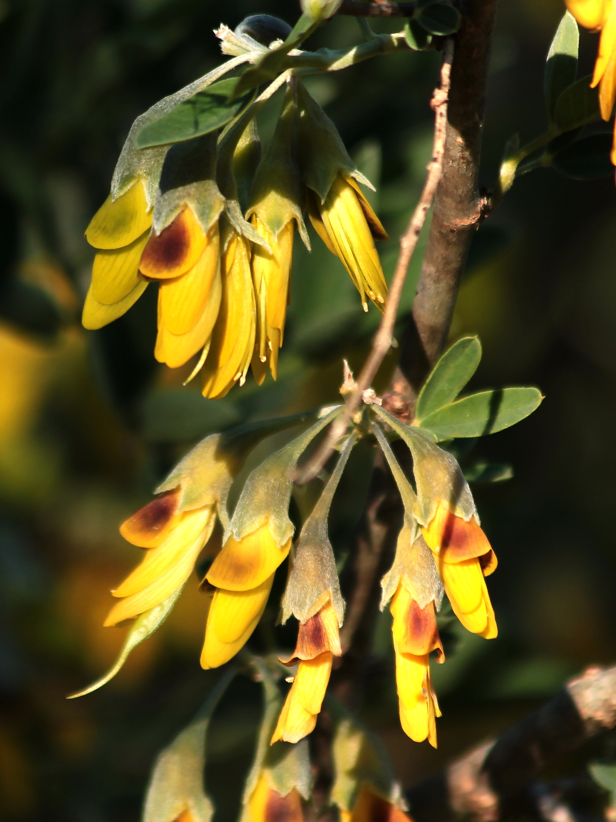 Anagyris foetida Linnaeus Reino Plantae Filo Magnoliophyta Classe Magnoliopsida Ordem Fabales Família Fabaceae Género Anagyris Nome Comum anágira, anágiris, anágira-de-espanha, anágira-fétida, anágiris-fedegosa